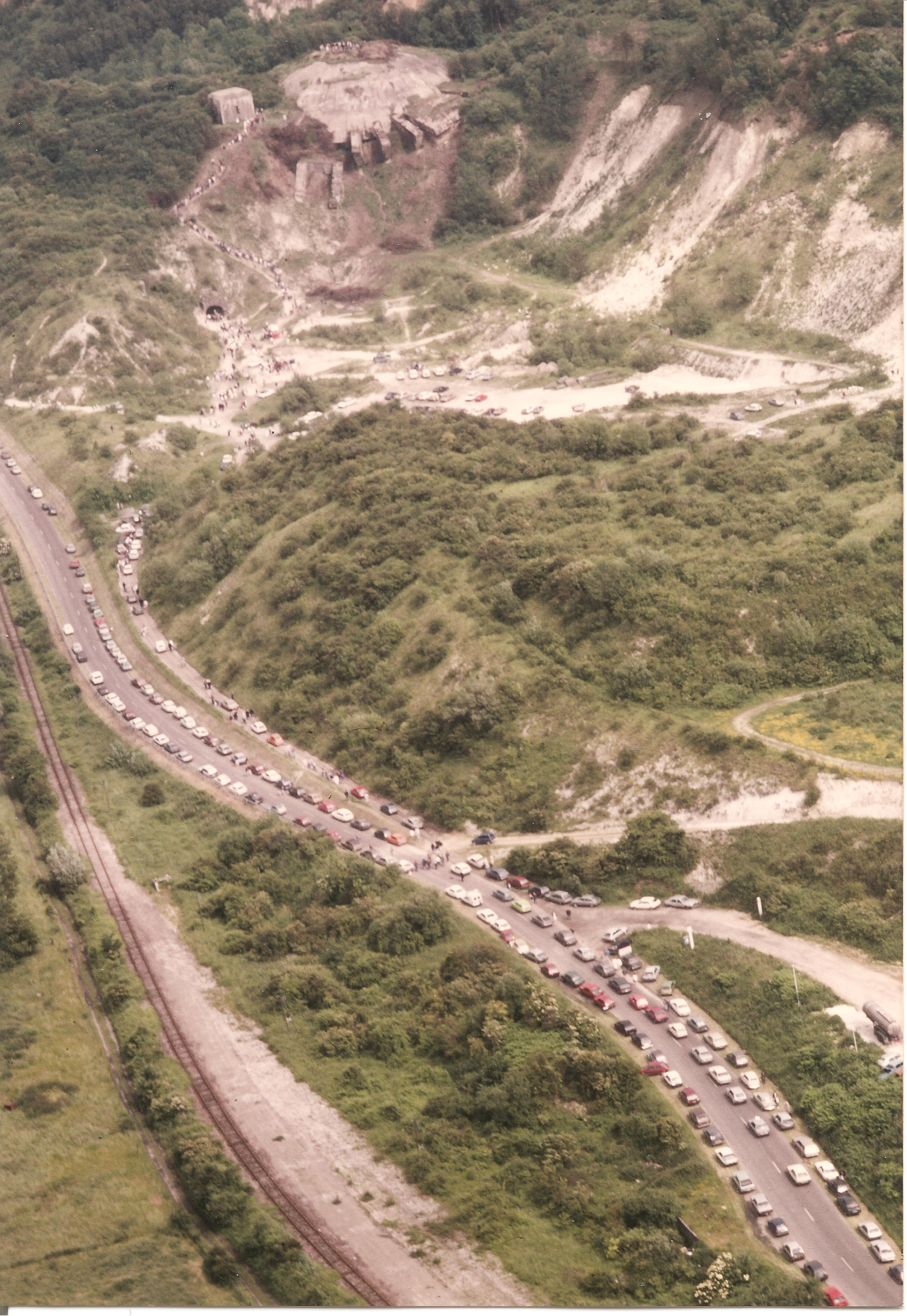 vue aérienne prise lors des portes ouvertes de 1987. [Photo Aéro Club de Saint-Omer]